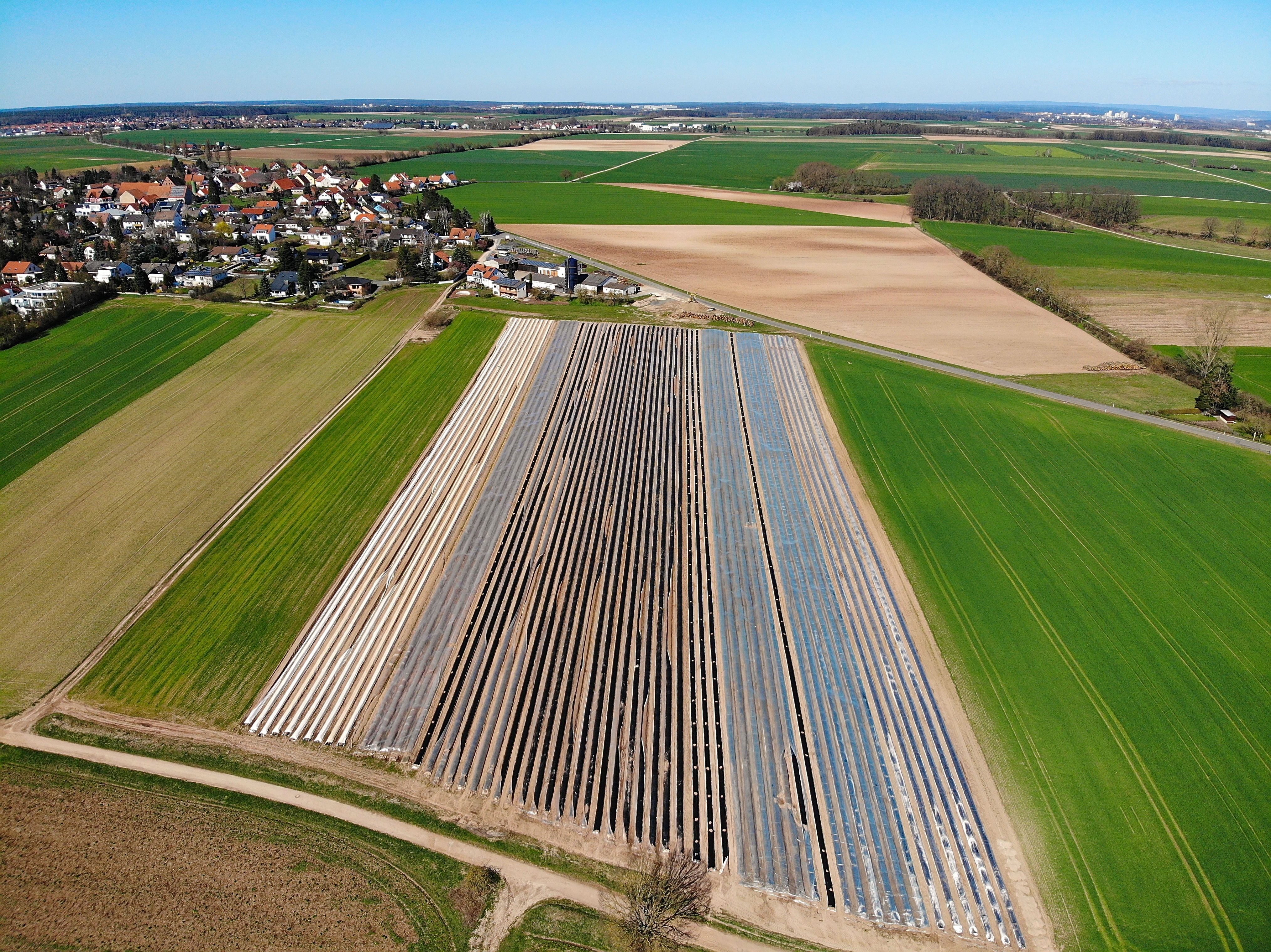 Spargelfeld bei Rothenberg (Obermichelbach) Luftaufnahme (2020)